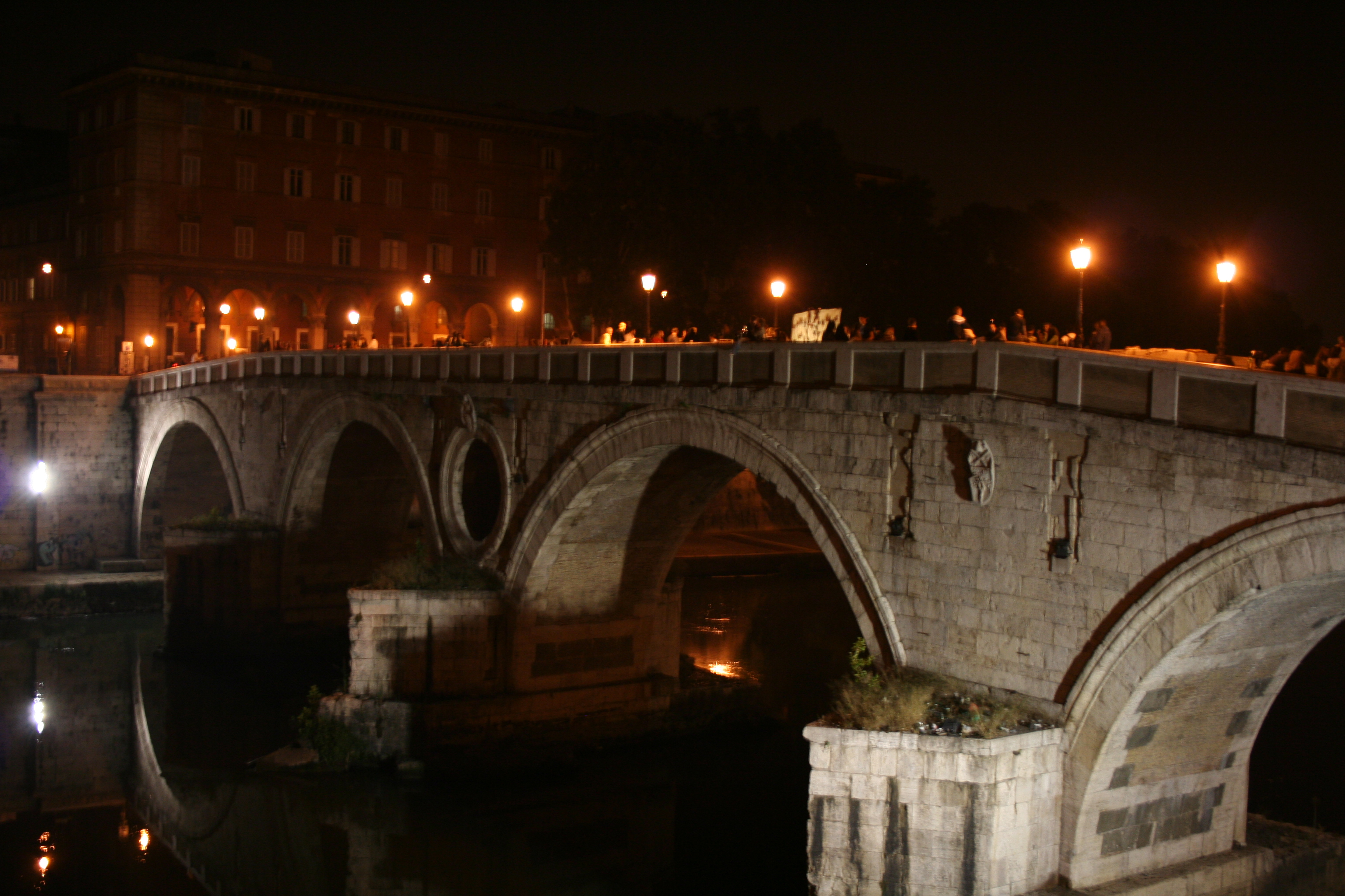 ROME - Ponte Sisto